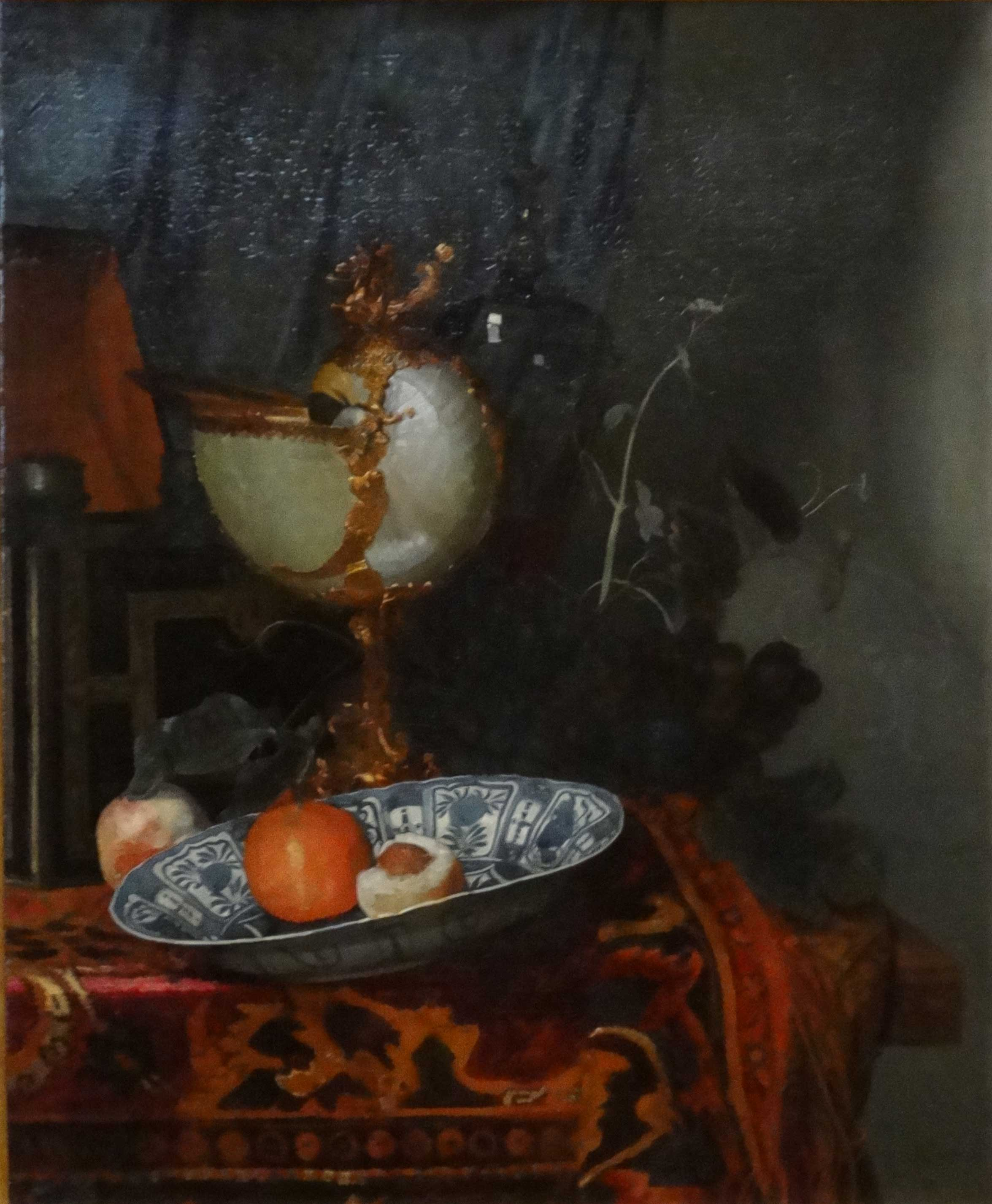 foto van een stilleven in het Museum Gouda